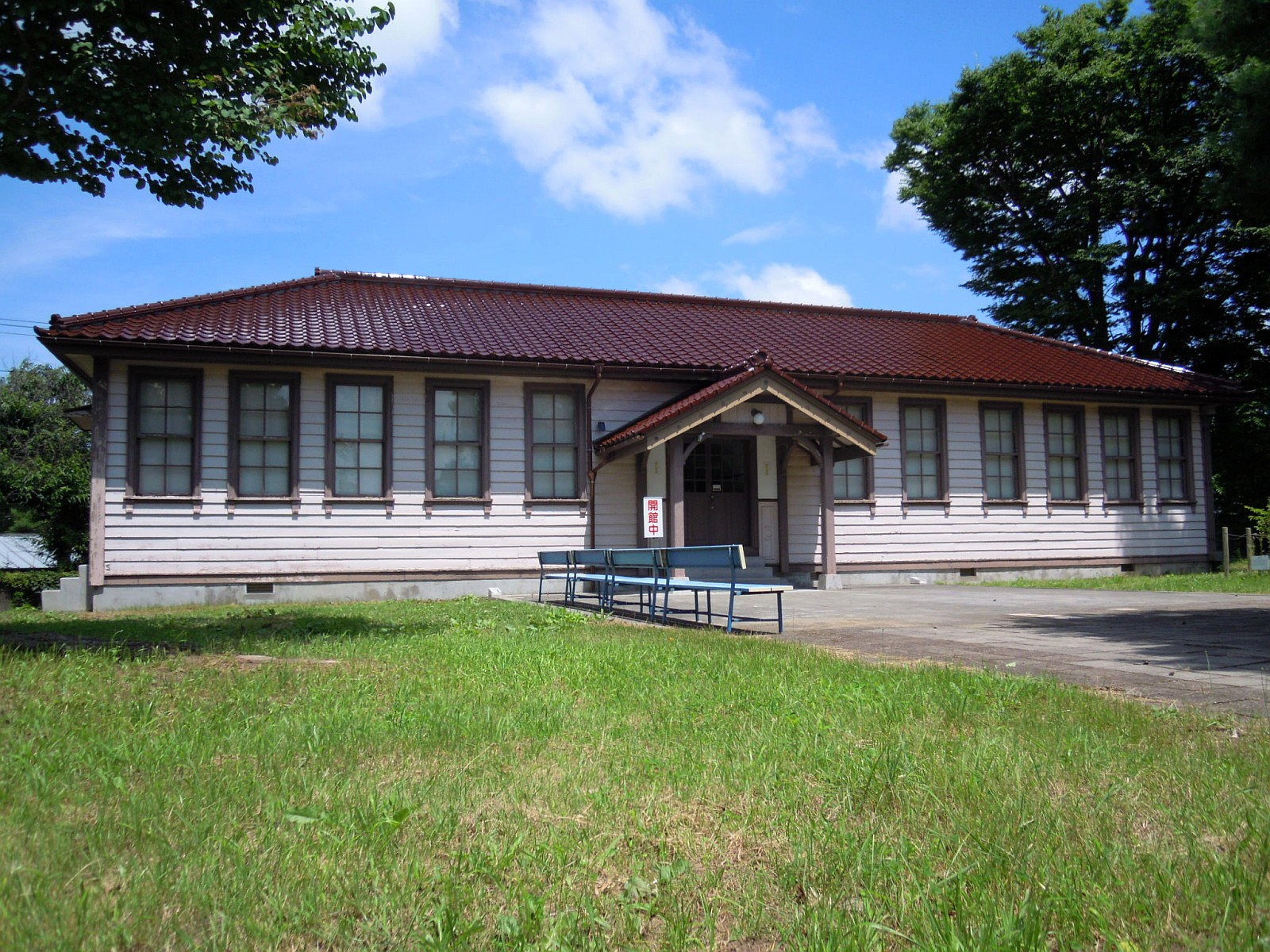 岩手県奥州市の水沢VLBI観測所内にある木村榮記念館